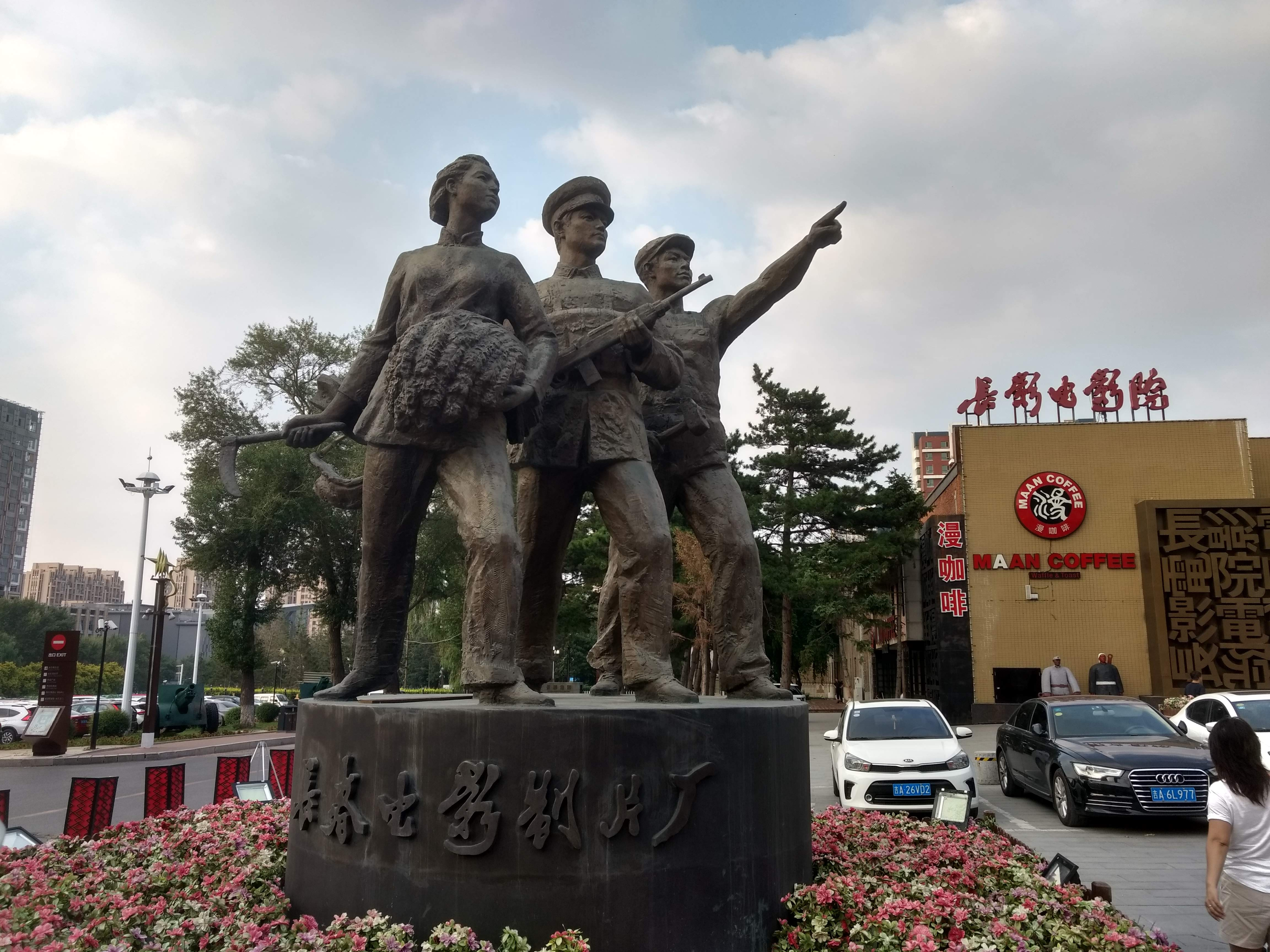 Estàtua amb el logotip del Chǎngchūn Diànyǐng Zhìpiànchǎng, o Changchun Film Studio, a la ciutat de Changchun, junt al cinema de la companyia.